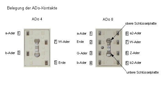 ADo-Kontaktbelegung